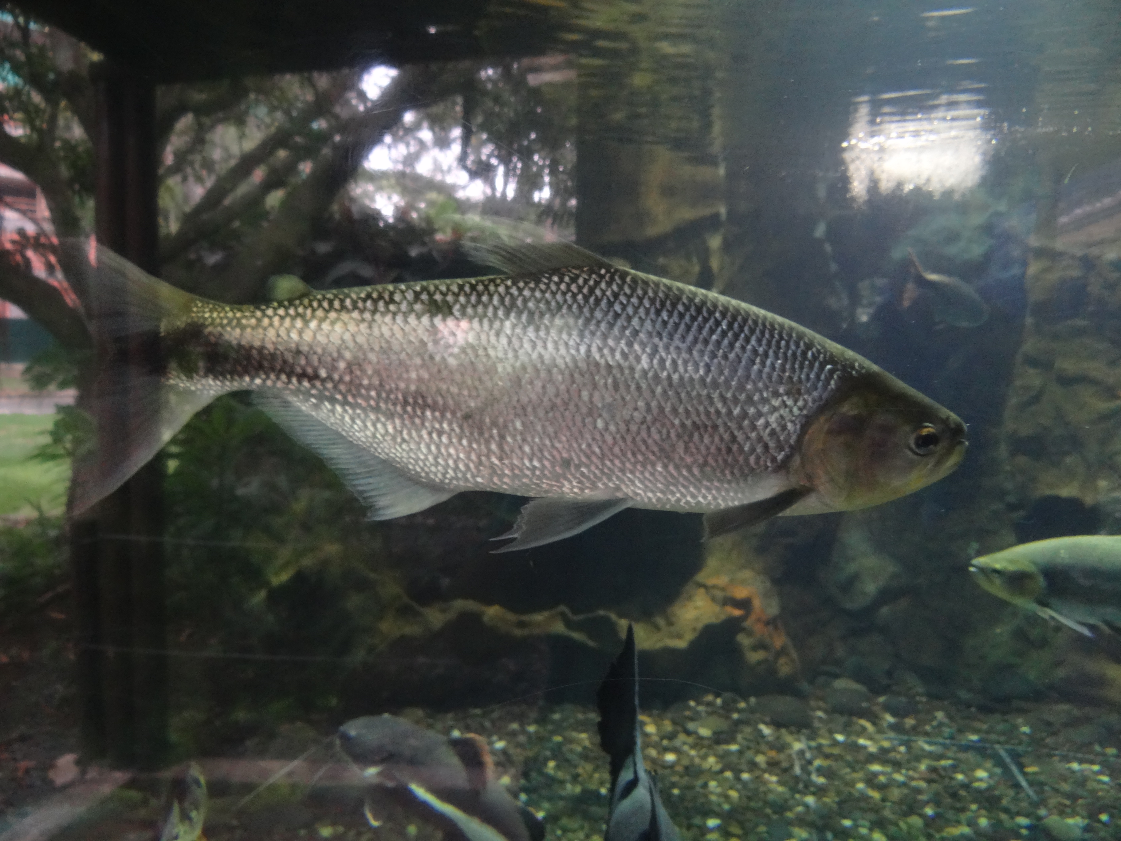 Dorada (Brycon moorei) en el acuario del Zoológico de Cali, Colombia